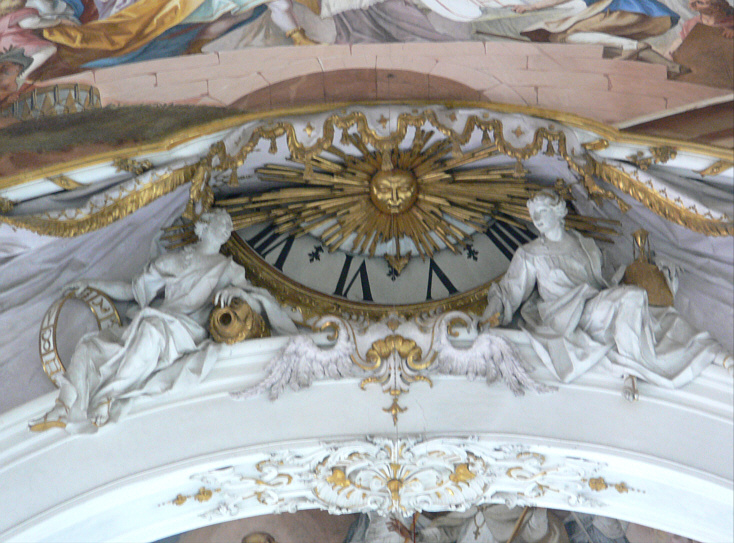 Marienmünster Dießen (ehem. Augustiner-Chorherren-Kirche Mariä Himmelfahrt, heute Pfarrkirche, Dießen am Ammersee) Uhr am Chorbogen Stuck von Franz Xaver Feuchtmayer d. Ä., Johann Michael Feuchtmayer d. J. und Johann Georg Üblher, um 1736/1737. Franz Xaver Feuchtmayer the Elder (1698–1764) Alternative namesFeichtmayrDescription German sculptor Date of birth/death11 August 1698 (baptised)before 28 April 1764Location of birth/deathWessobrunnAugsburgAuthority control VIAF: 50073121 GND: 121087468 Johann Michael Feuchtmayer (1696–1772) Alternative namesJohann Michael Feichtmayr (3)Description German sculptor Date of birth/death17 October 16964 June 1772Location of birth/deathHaid bei WessobrunnAugsburgAuthority control VIAF: 37716385 LCCN: nr94017622 GND: 118974459 WorldCat Johann Georg Üblher (1703–1763) Alternative namesYbelherr, Johann Georg; Üblhör, Johann GeorgDescription German sculptor Date of birth/death23 March 170327 April 1763Location of birth/deathGaispoint bei WessobrunnMaria Steinbach bei Legau